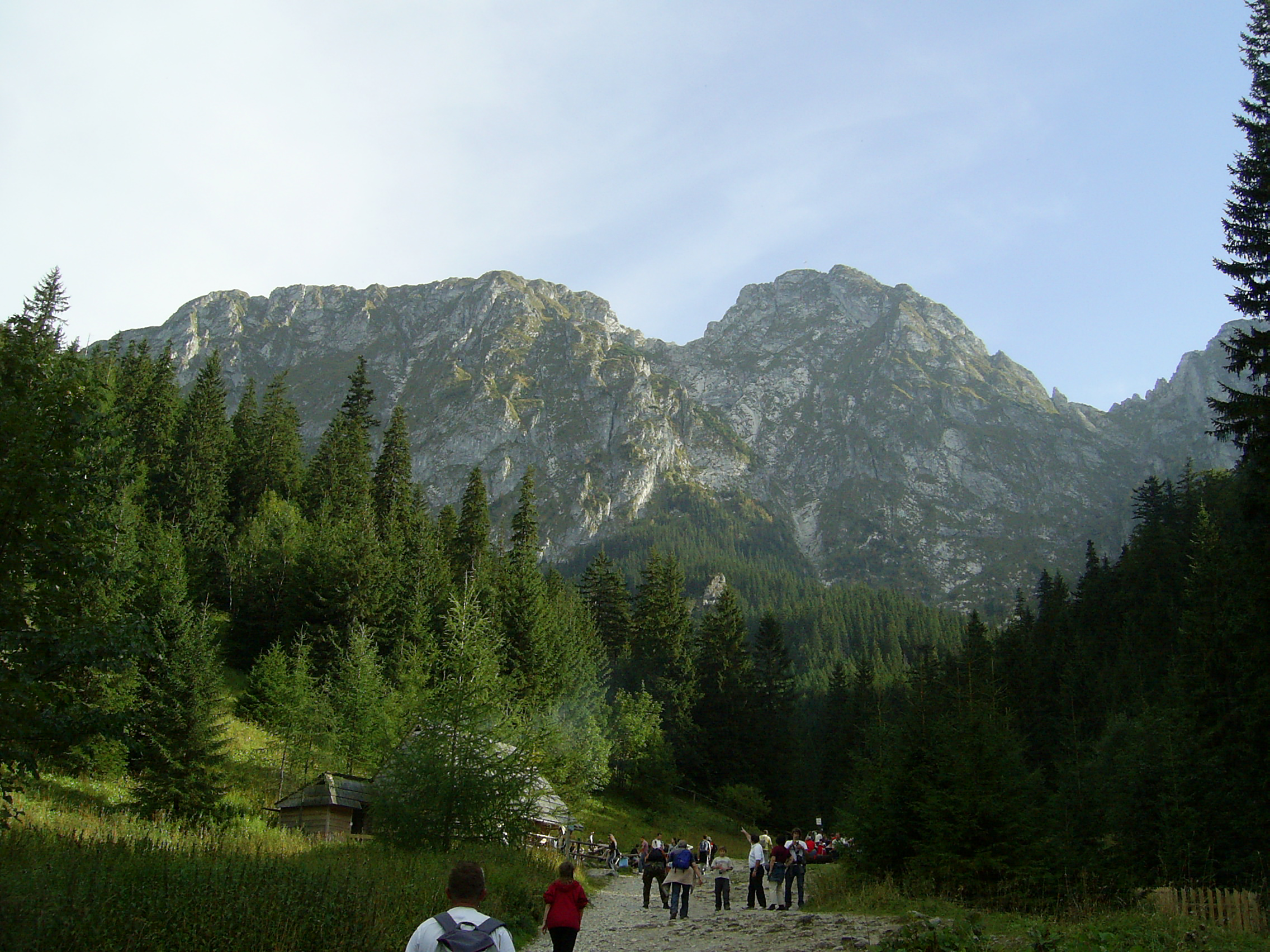 Widok na Giewont z Polany Strążyskiej